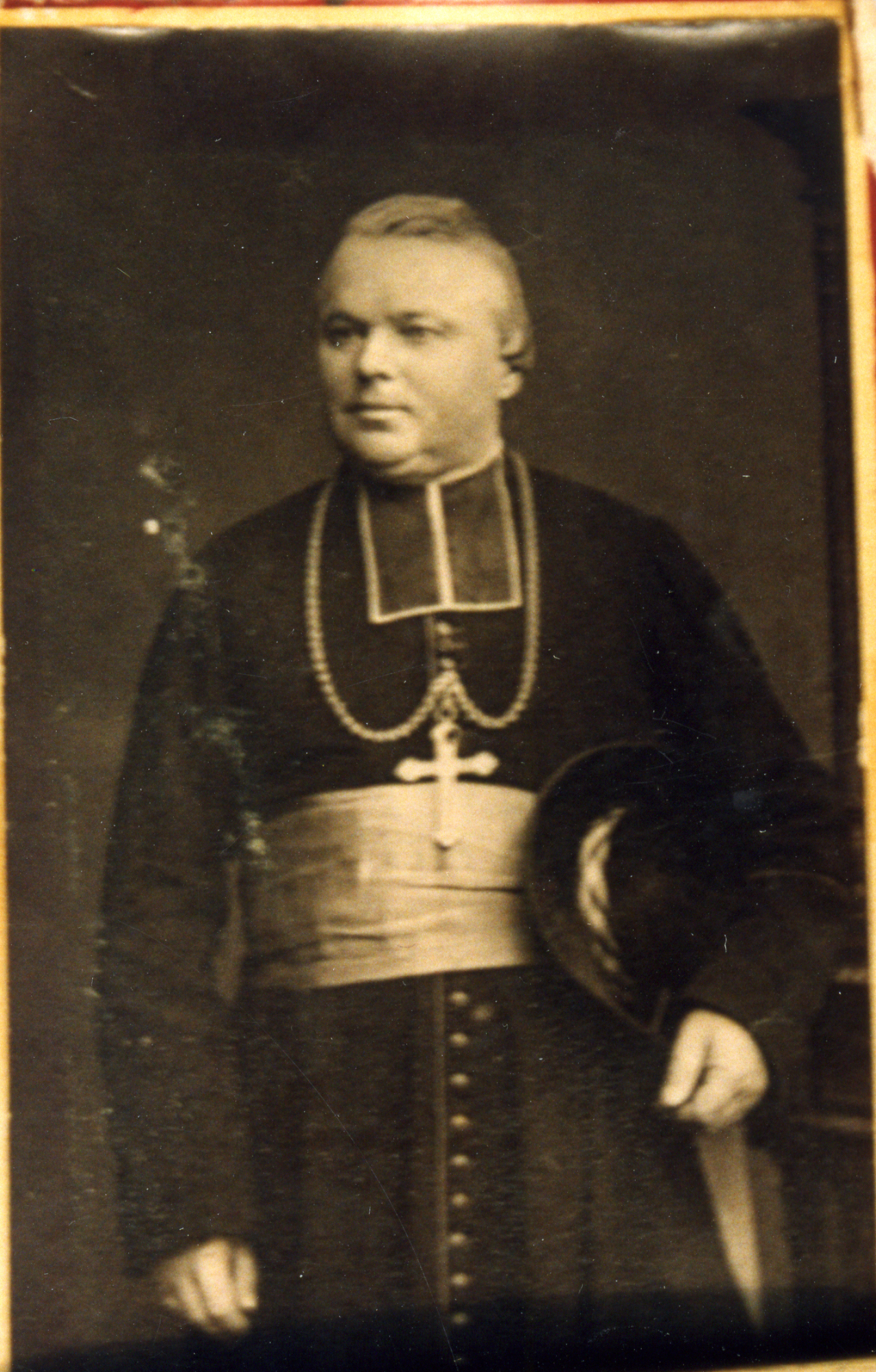 photographie de M Trégaro en habit ecclésiastique